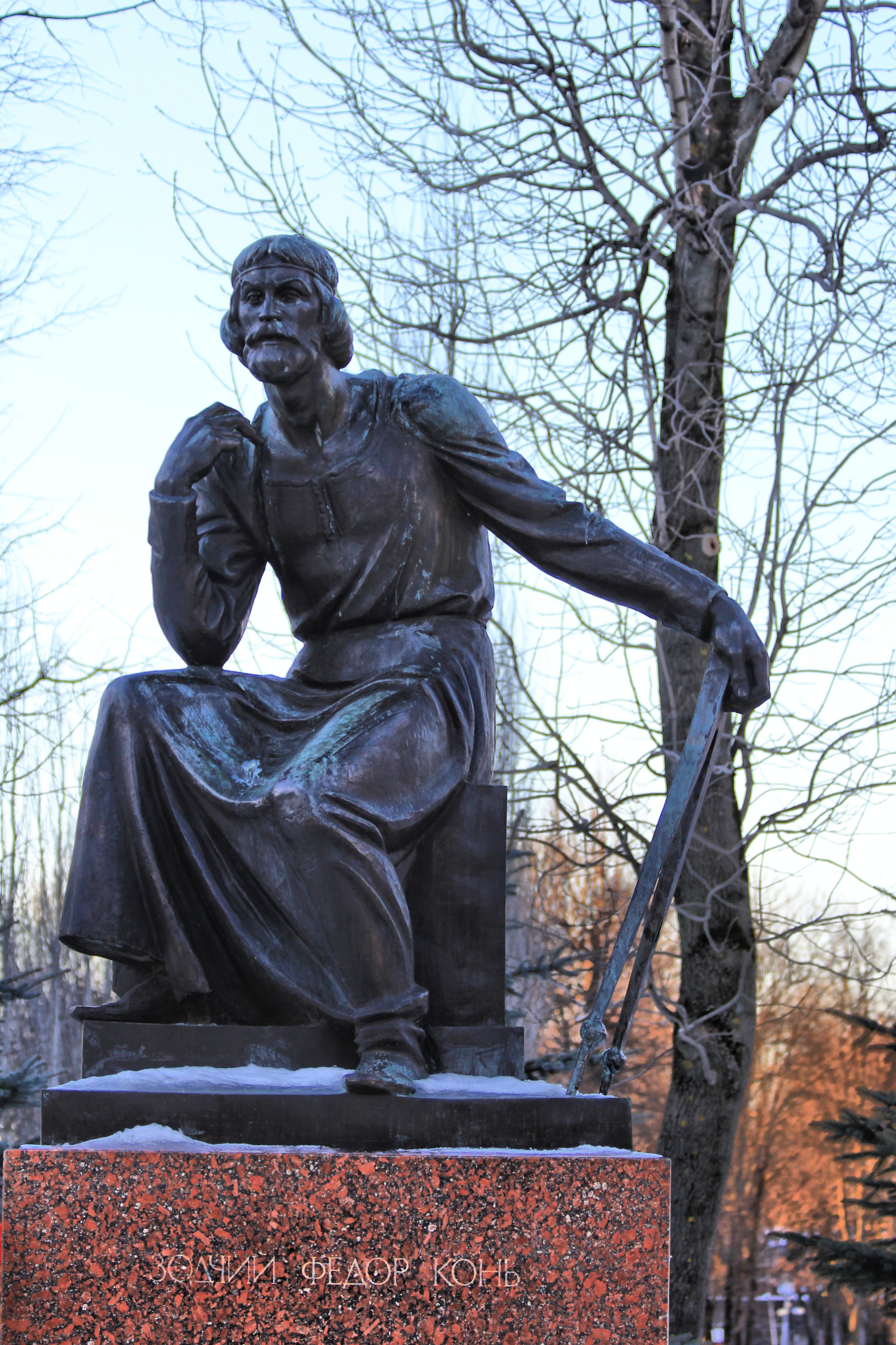 Памятник Коню Ф.: улица Октябрьской революции, Смоленск, Смоленский район, Смоленская область